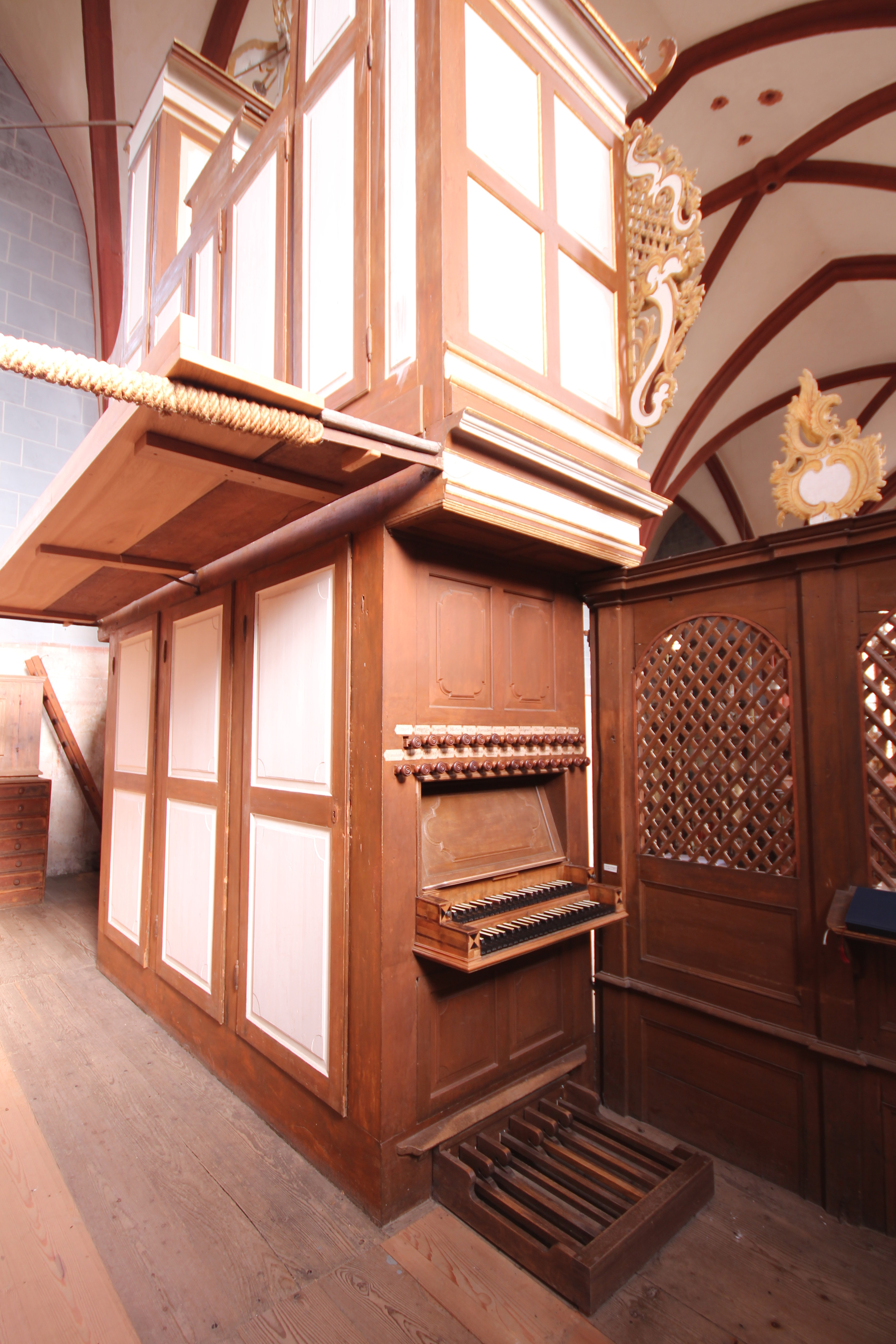 Rückansicht der Schöler-Orgel der Klosterkirche zu Solms-Altenberg mit Spielanlage